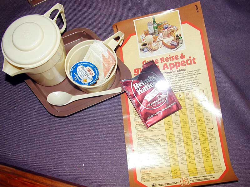 DSG